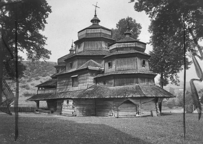 Isaje, województwo lwowskie. Drewniana cerkiew z XVII wieku.